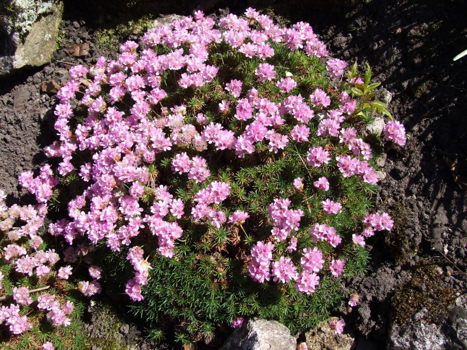 Armeria juniperifolia